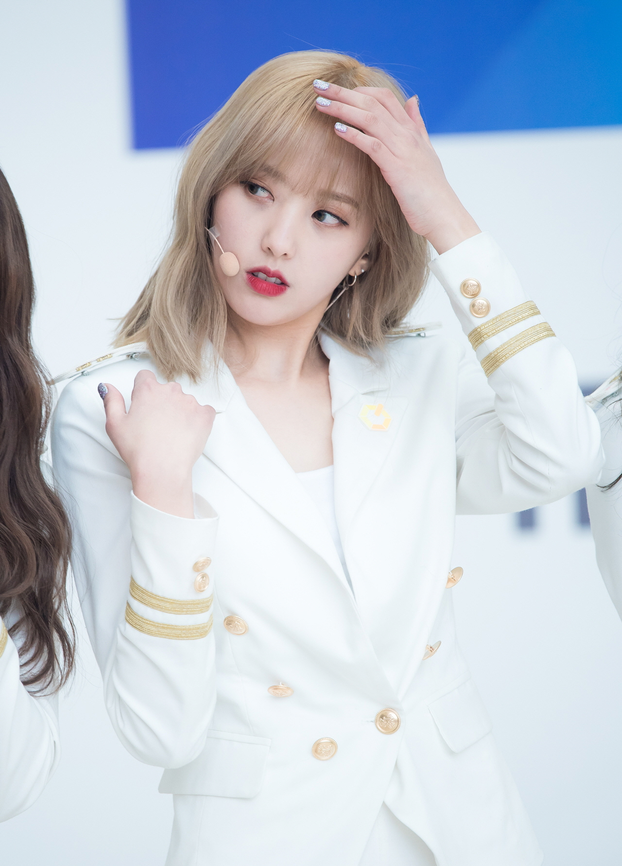 180211 더유닛 유닛G